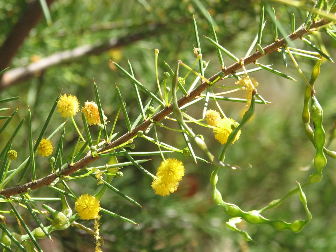 Acacia tetragonophylla, Geelong Botanic Gardens, Victoria, Australia